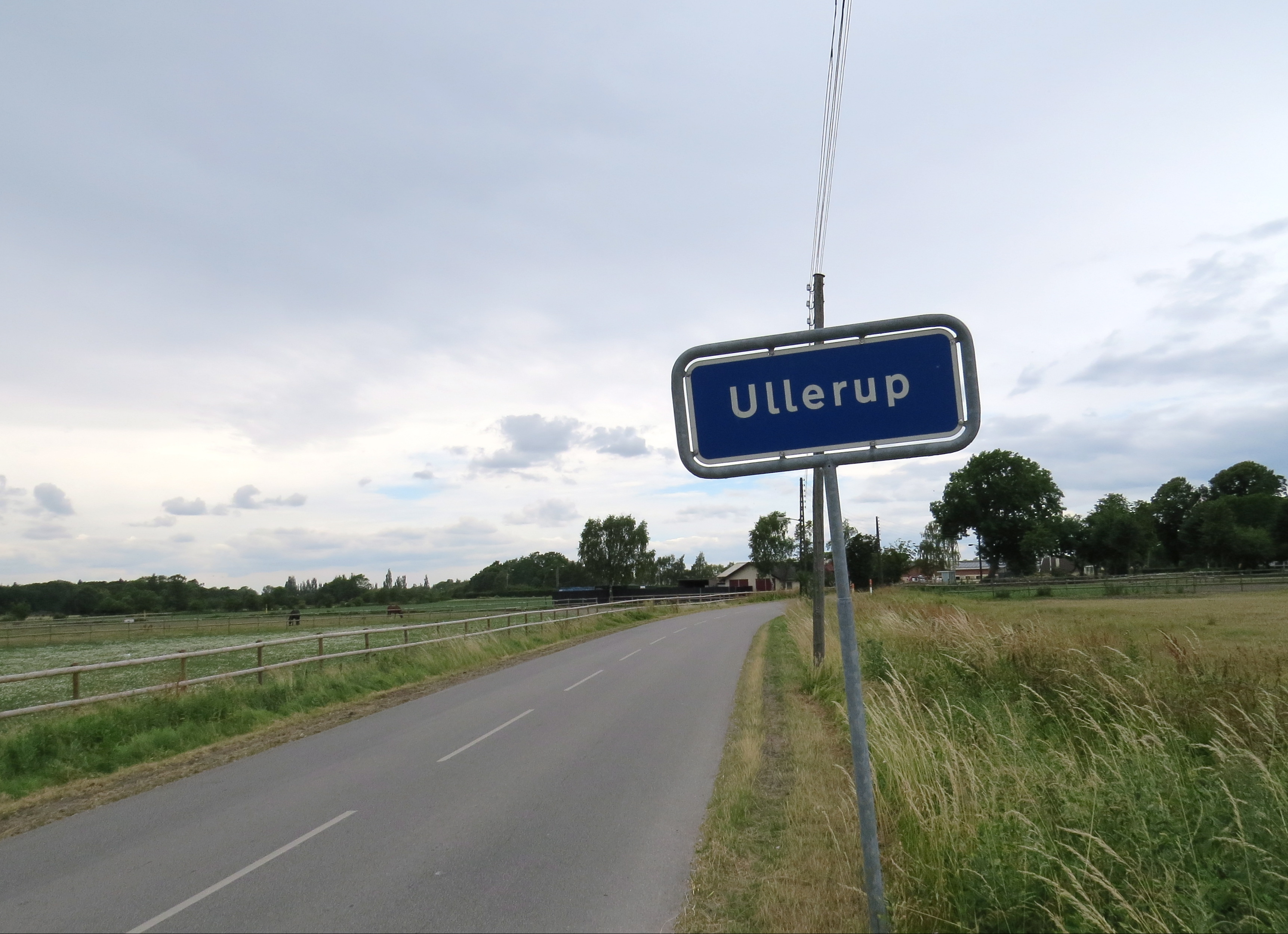 Ullerup på Amager